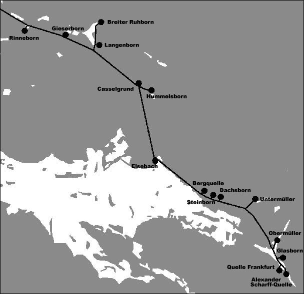 Die Trinkwasserleitung im Gewinnungsgebiet Spessart